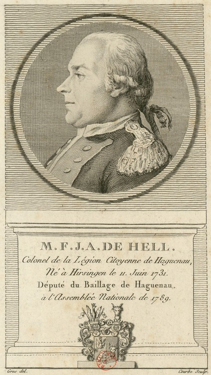 J. de Hell, député du baillage de Haguenau en 1789